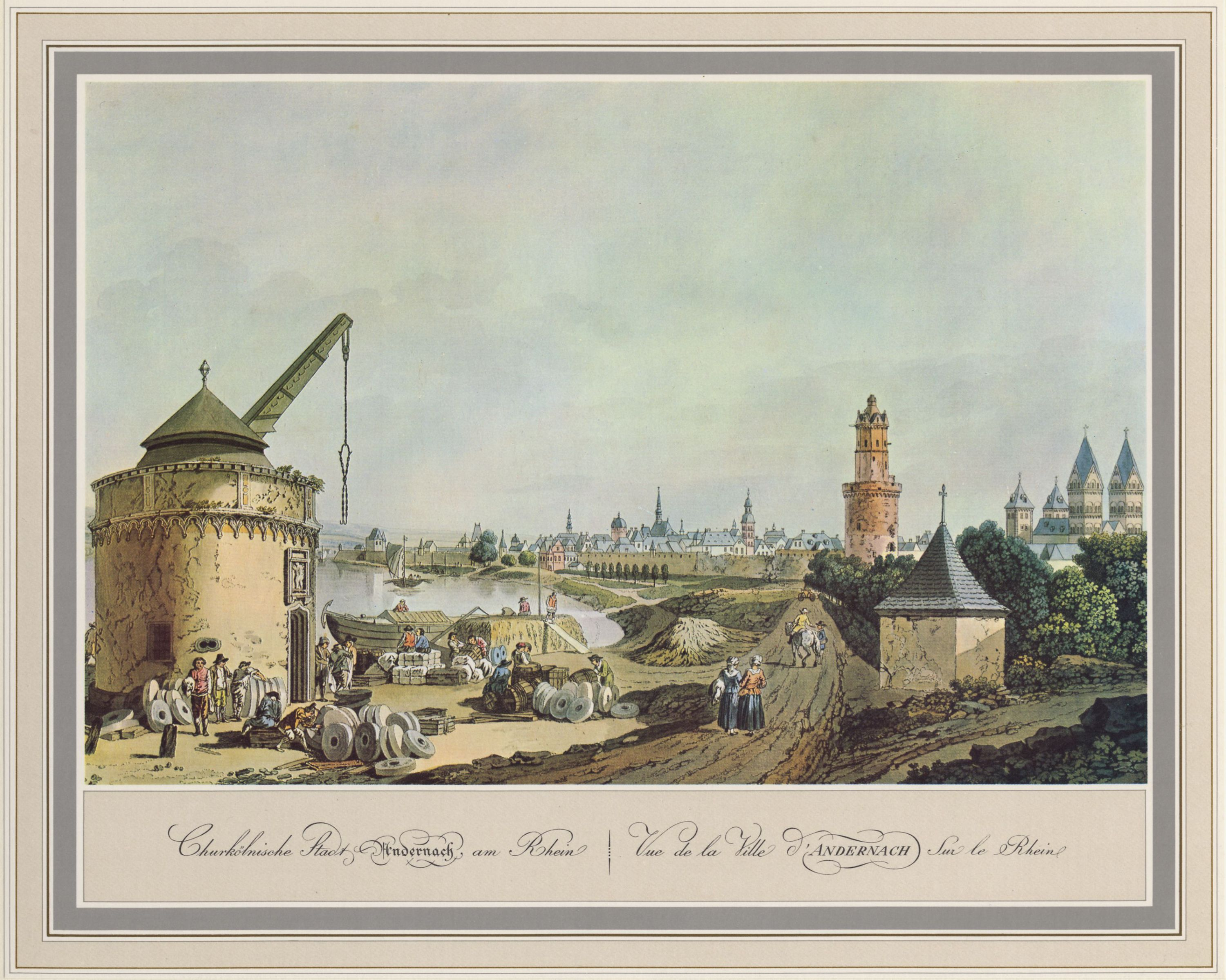 Andernach, Ansicht von Nordwesten mit Hafen und Rundem Turm; Kupferstich, aquarelliert, aus: »Fünfzig malerische Ansichten Rhein-Stroms von Speyer bis Düsseldorf«, erschienen bei Artaria in Wien 1798; nach Aquarellen von Laurenz Janscha, die im Sommer 1792 entstanden